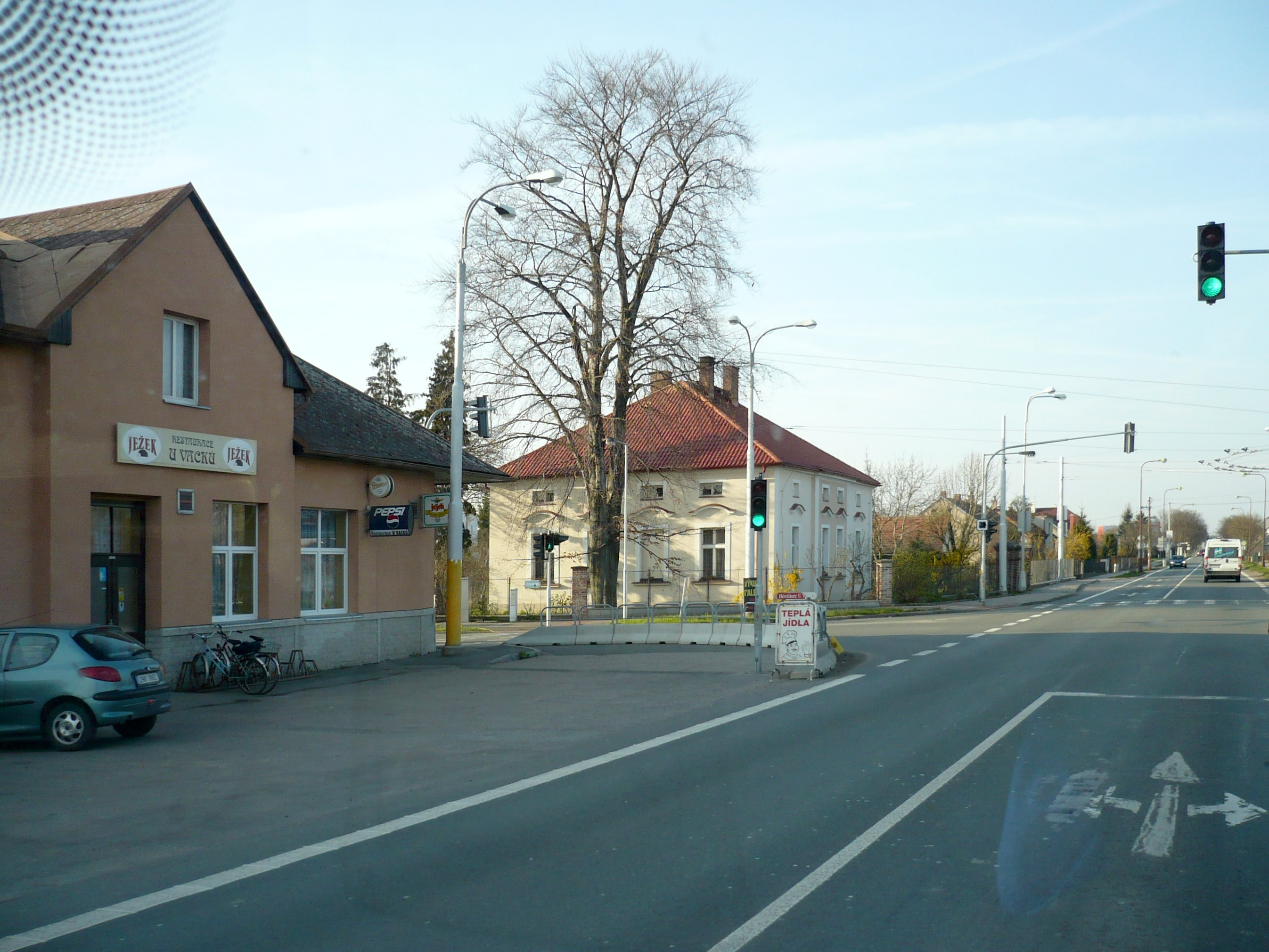 Hradec Králové, Plačice - ulice Kutnohorská, křižovatka s Vlčkovickou